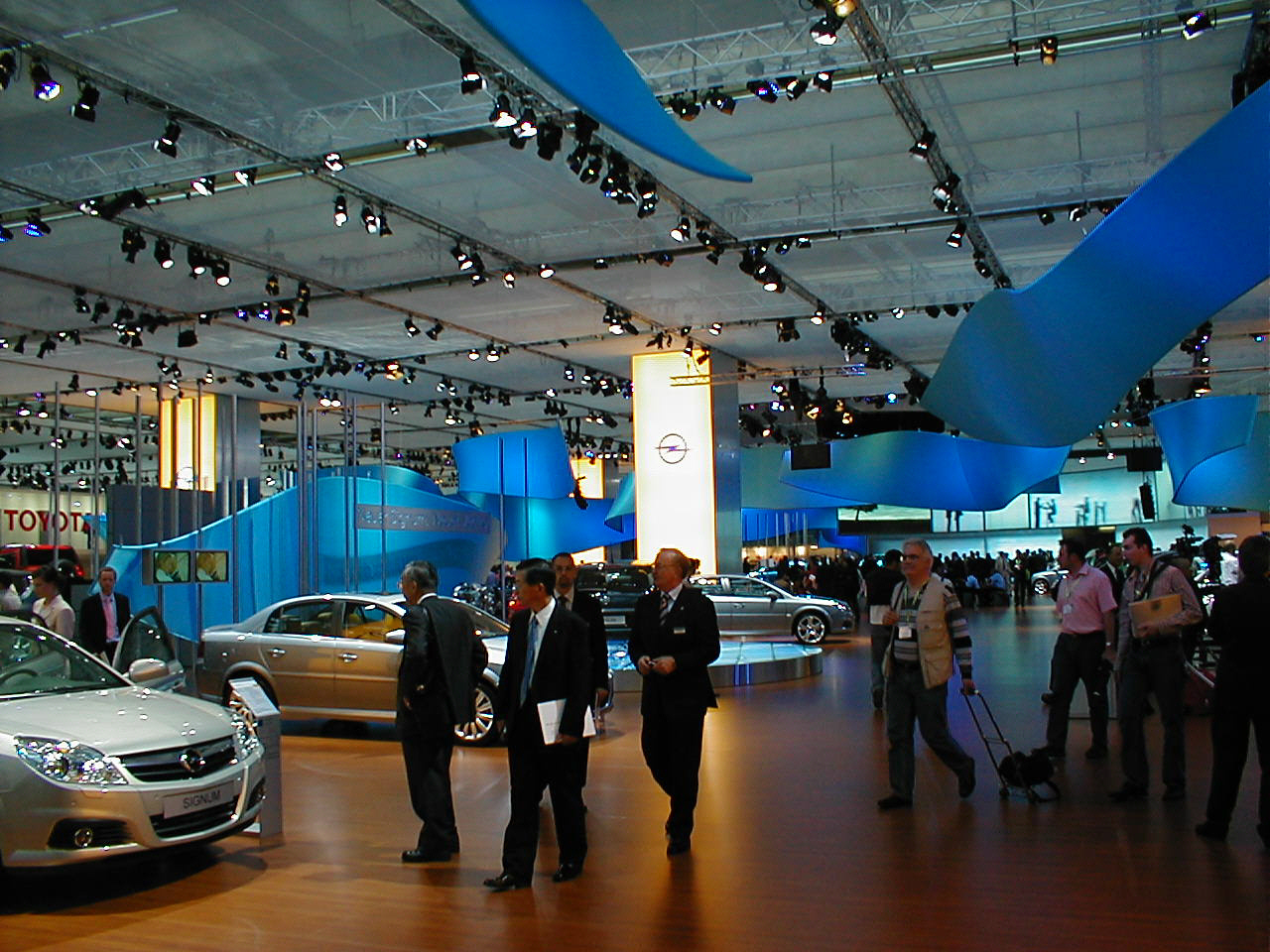 Opel-Präsentation auf der IAA 2005